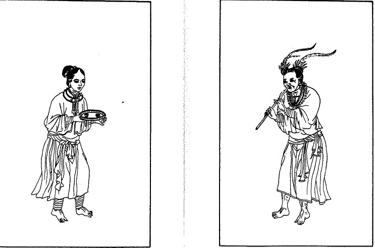 Siraya people 西拉雅族